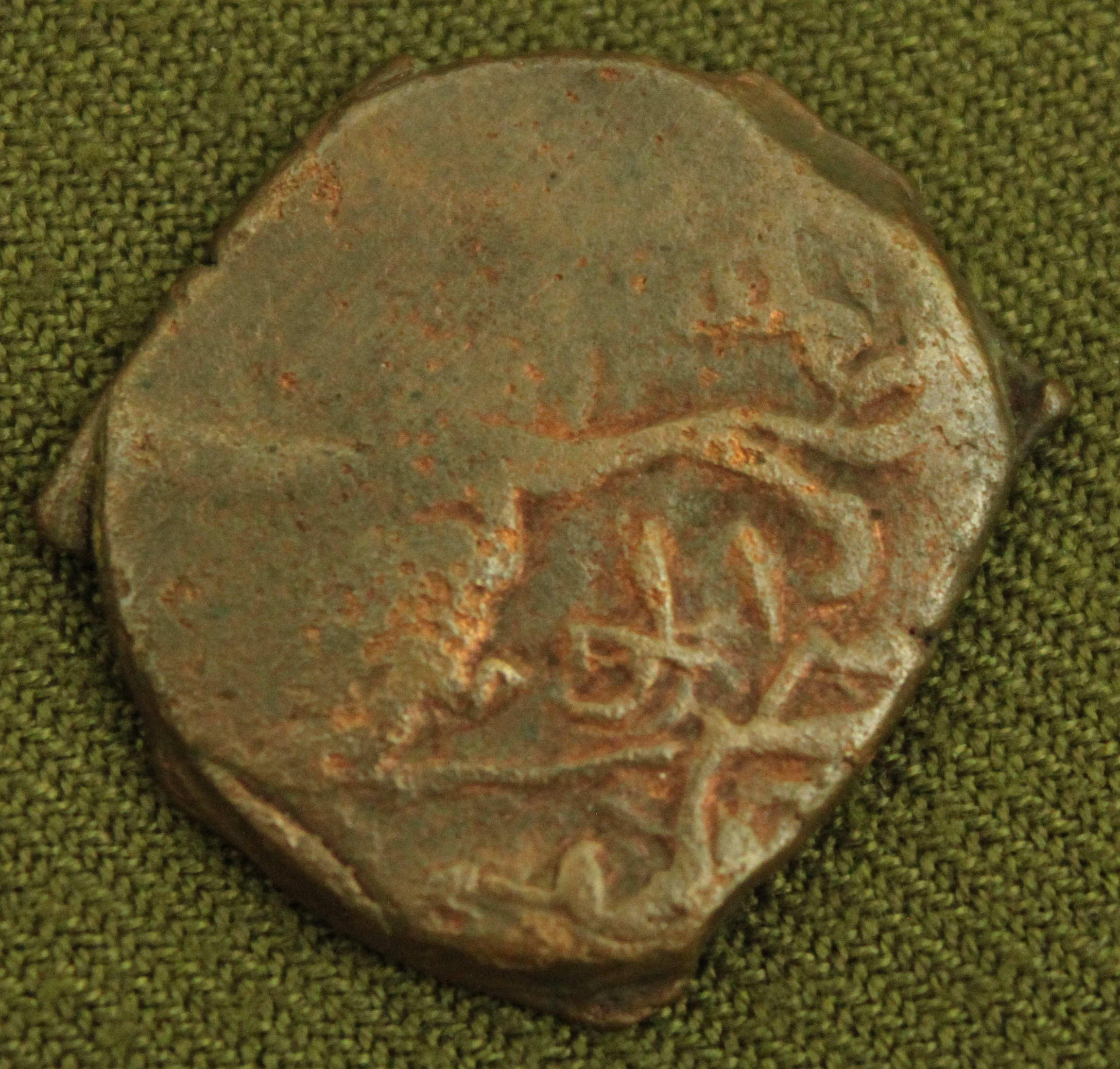 Атабеки Азербайджана Эльдагизы, атабек Шамседдин Эльданиз, медный дирхам.